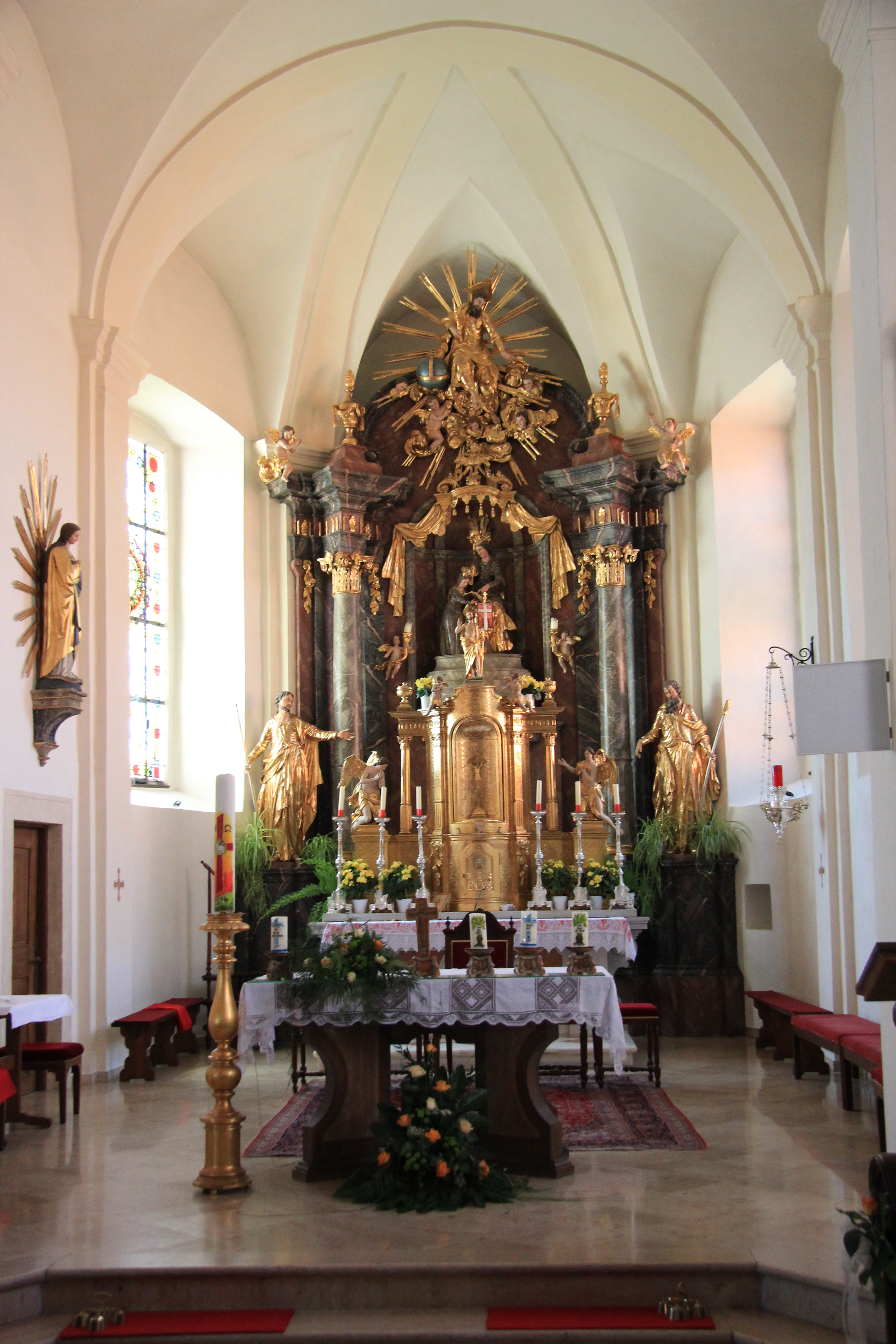 Sankt Anna am Aigen, Südoststeiermark